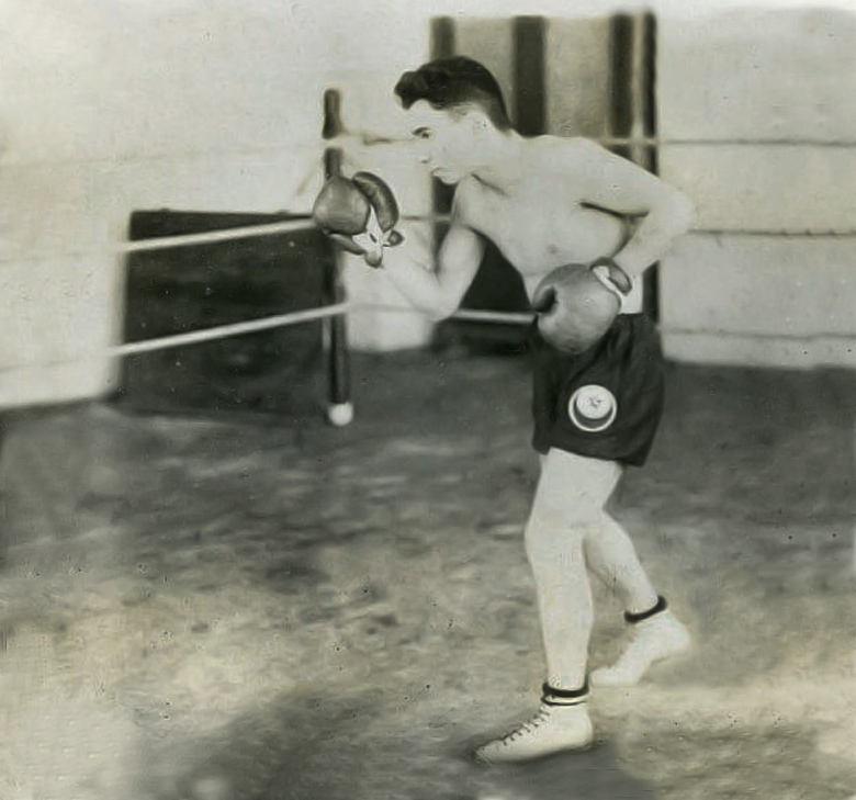 Azerbaijani boxer Abbas Farhad oglu Agalarov